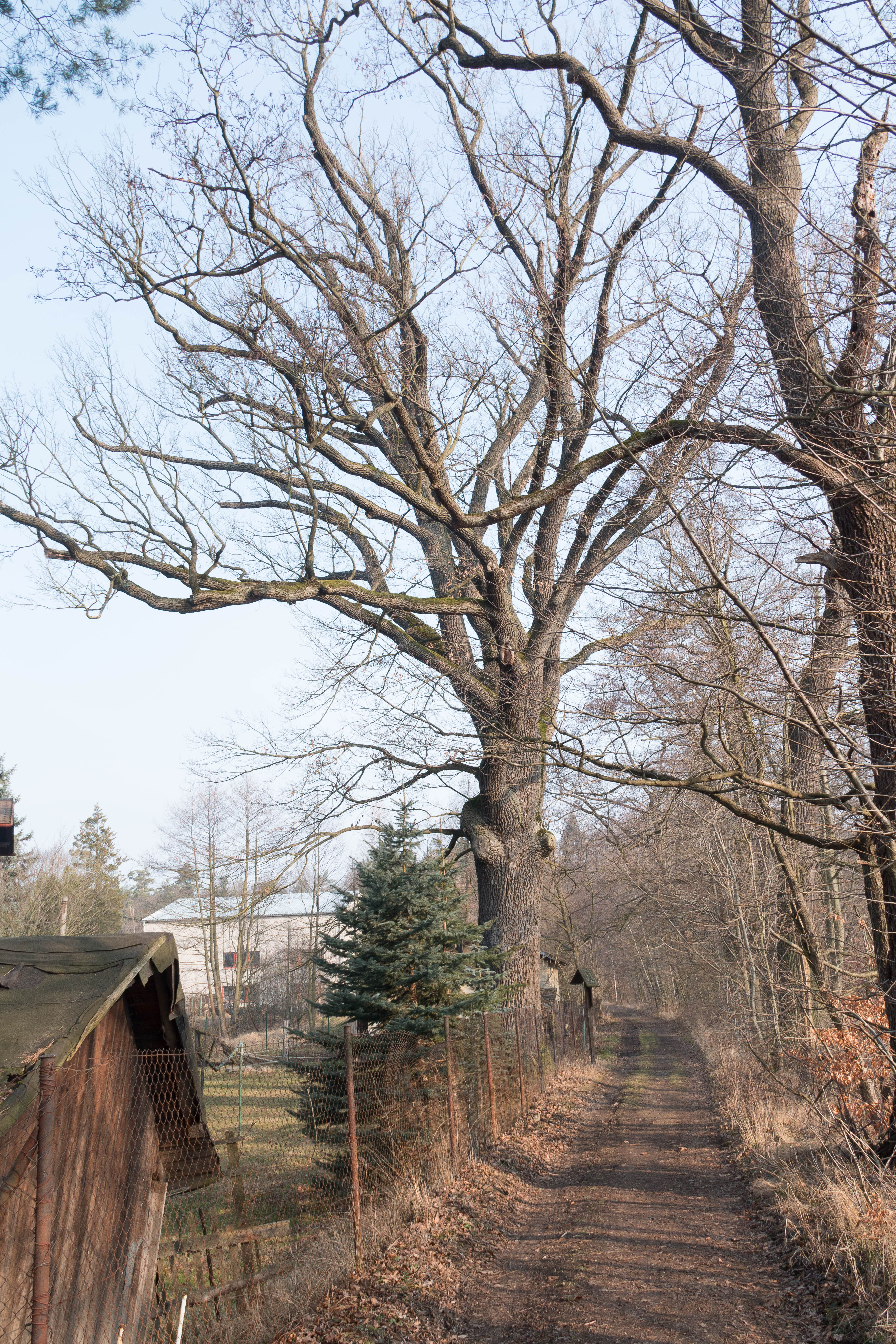 Libáň památný dub